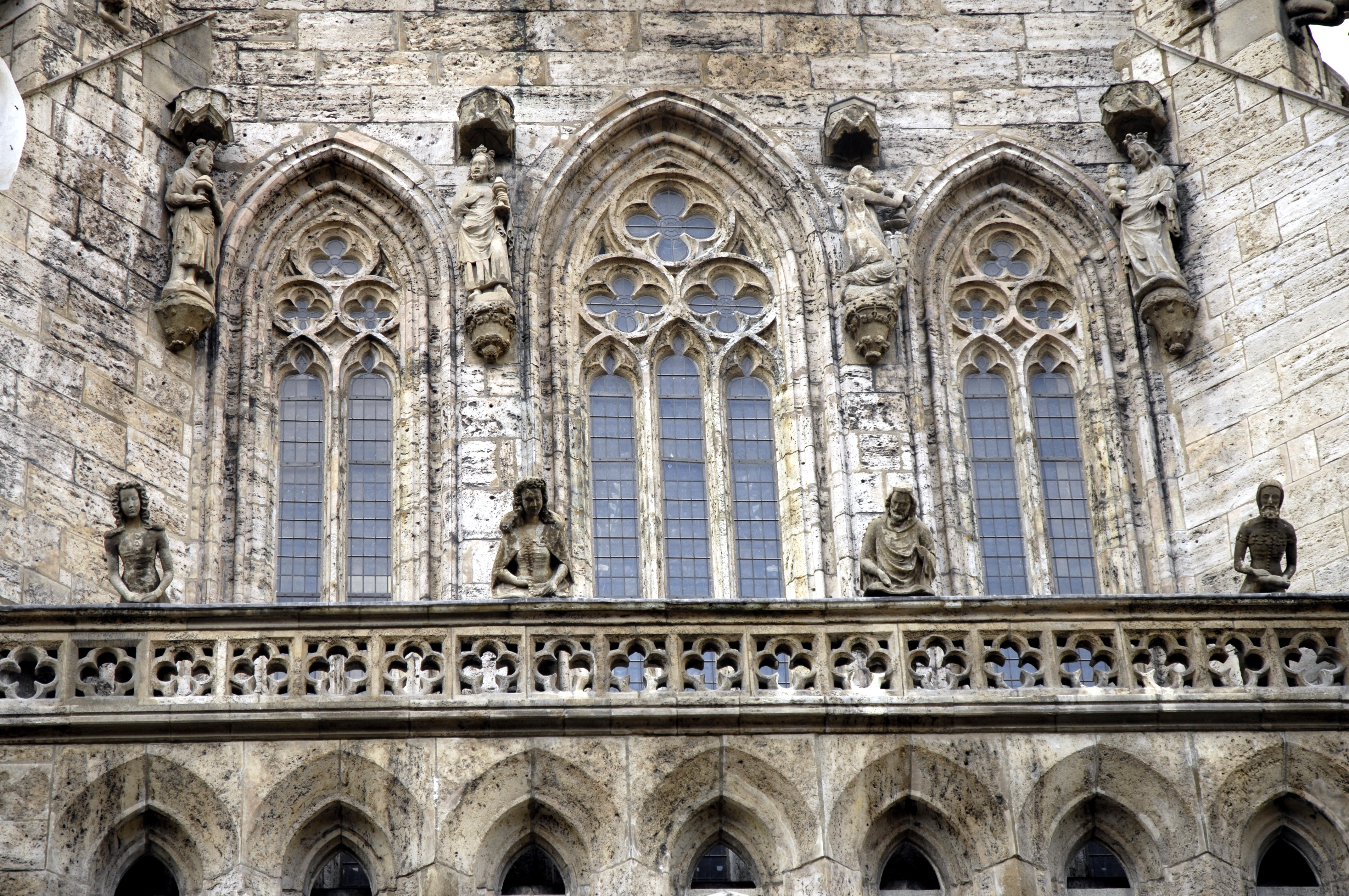 Mühlhausen/Thüringen, Marienkirche, Fassade des Südquerschiffs